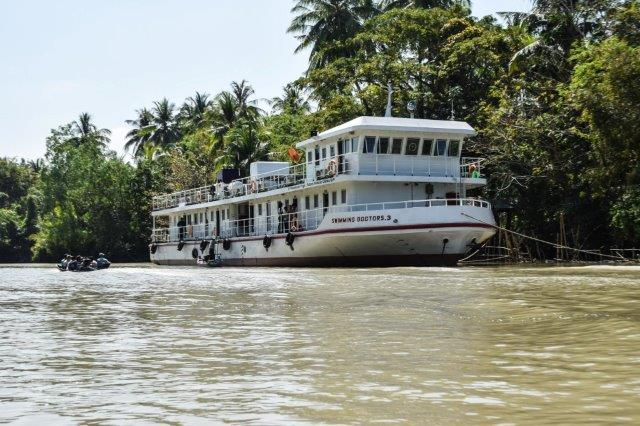 Die Swimming Doctors 3 im Einsatz im Flussdelta westlich von Yangon, Myanmar.